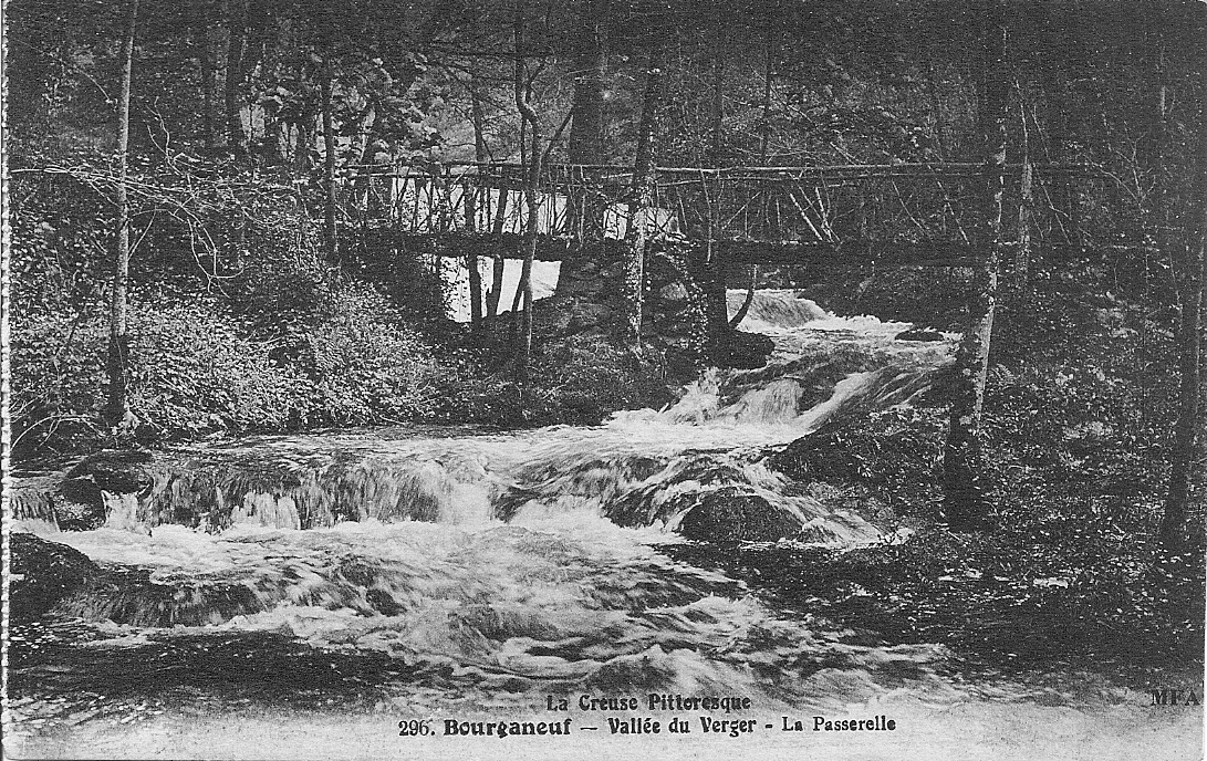 Bourganeuf les gorges du Vergers vers 1905